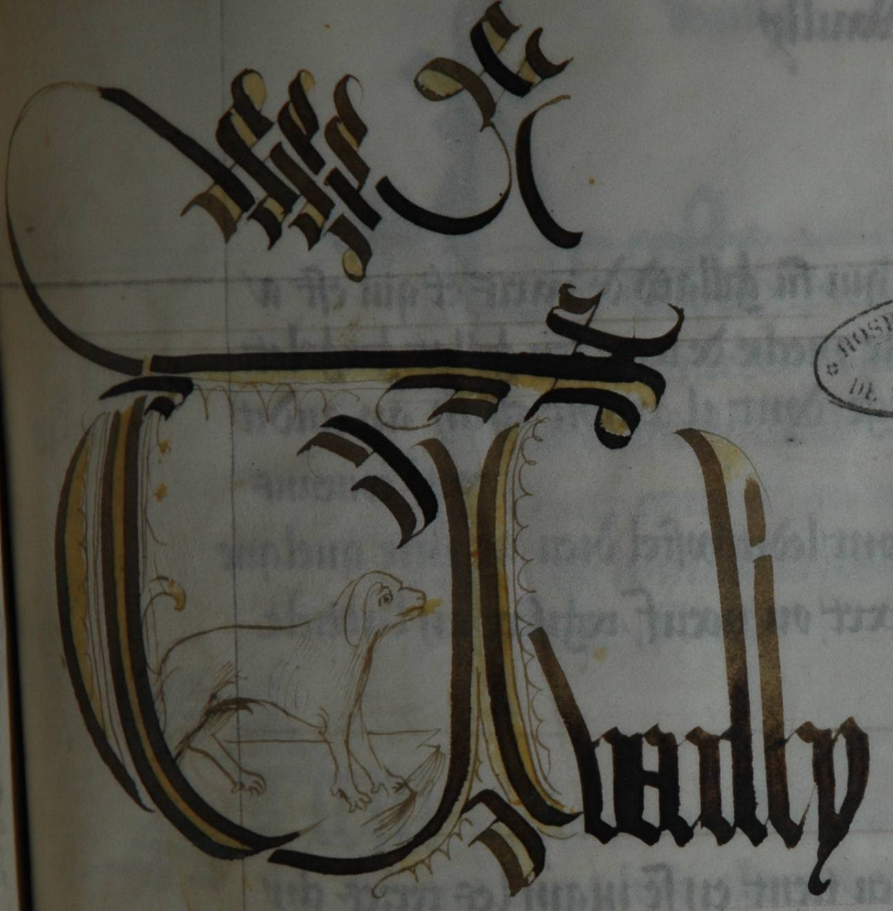 Lettrine du ceuilloir de l'Hotel-Dieu 1477 représentant le chien qui "Wail", article Wailly, manuscrit prop du CHAM.